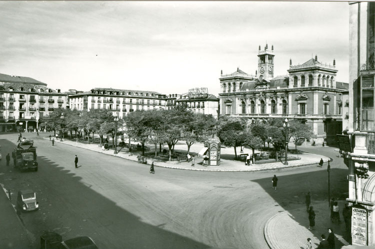 Ayuntamiento. Plaza Mayor - Valladolid - Postal B/N